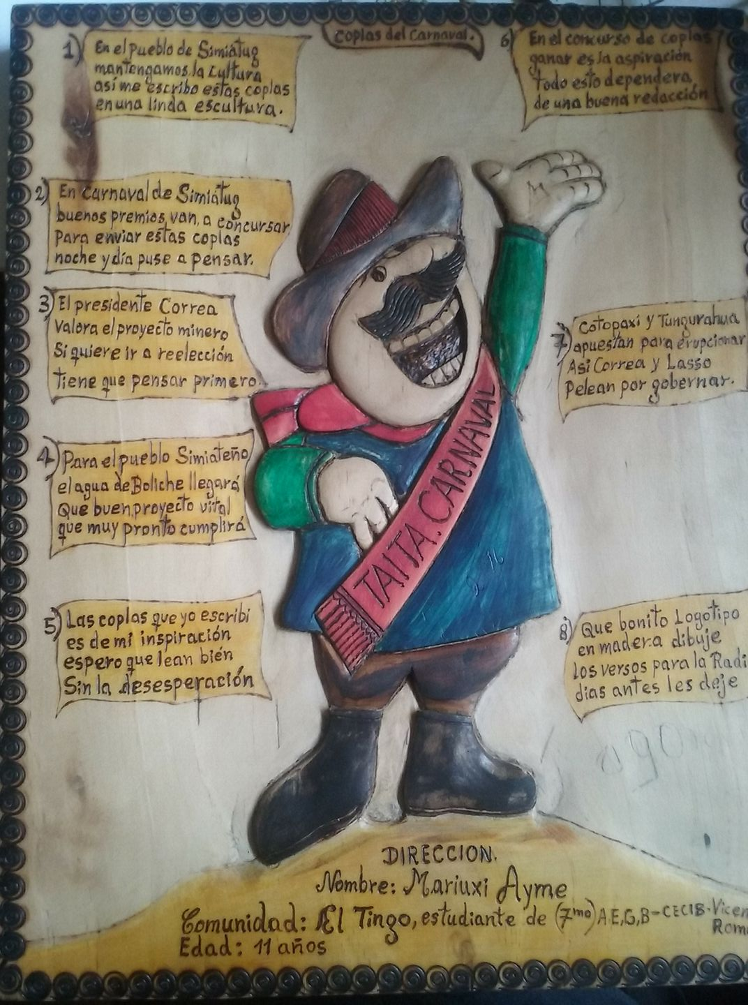 La emisora comunitaria Runacunapac Yachana es la encargada de organizar el concurso de coplas del carnaval